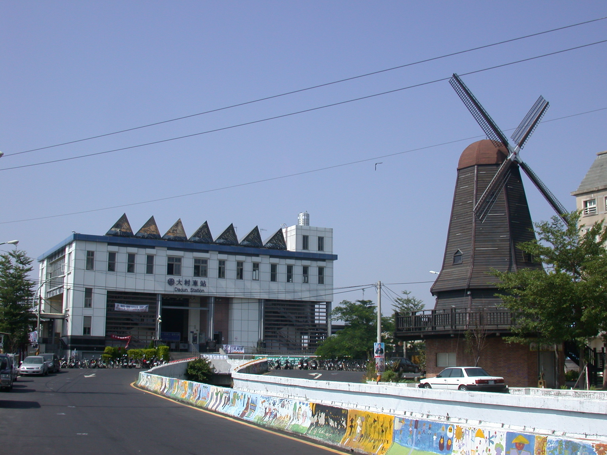 Bân-lâm-gú: 彰化縣大村鄉大村車站頭前的道路佮過溝排水，正手爿是歐洲櫻花村社區的風車。